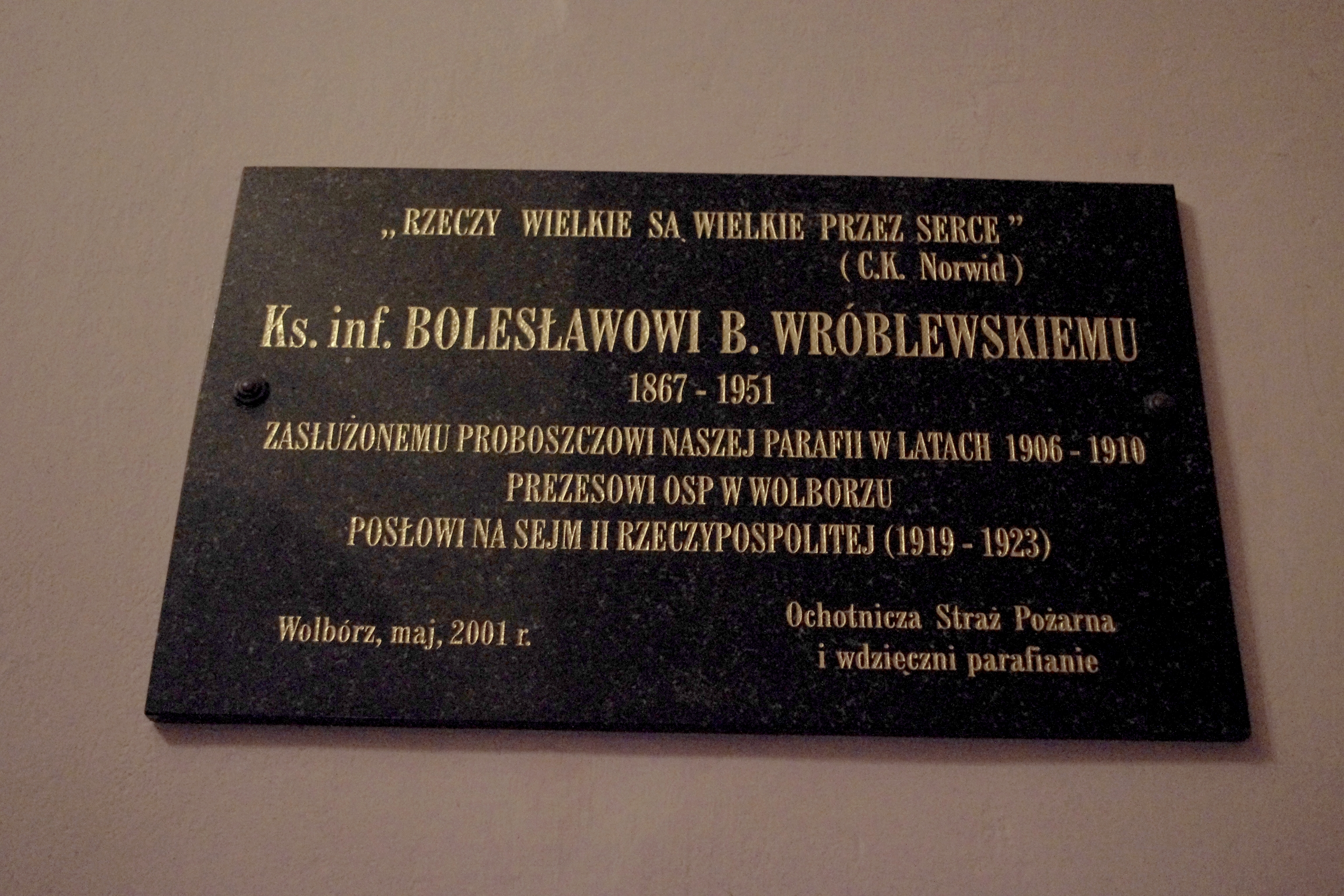 Tablica upamiętniająca ks. Bolesława Wróblewskiego (1862-1951) – duchownego katolickiego, posła na Sejm Ustawodawczy II RP, proboszcza wolborskiego w latach 1906-1910, prezes Ochotniczej Straży Pożarnej w Wolborzu, w wolborskiej Kolegiacie św. Mikołaja.